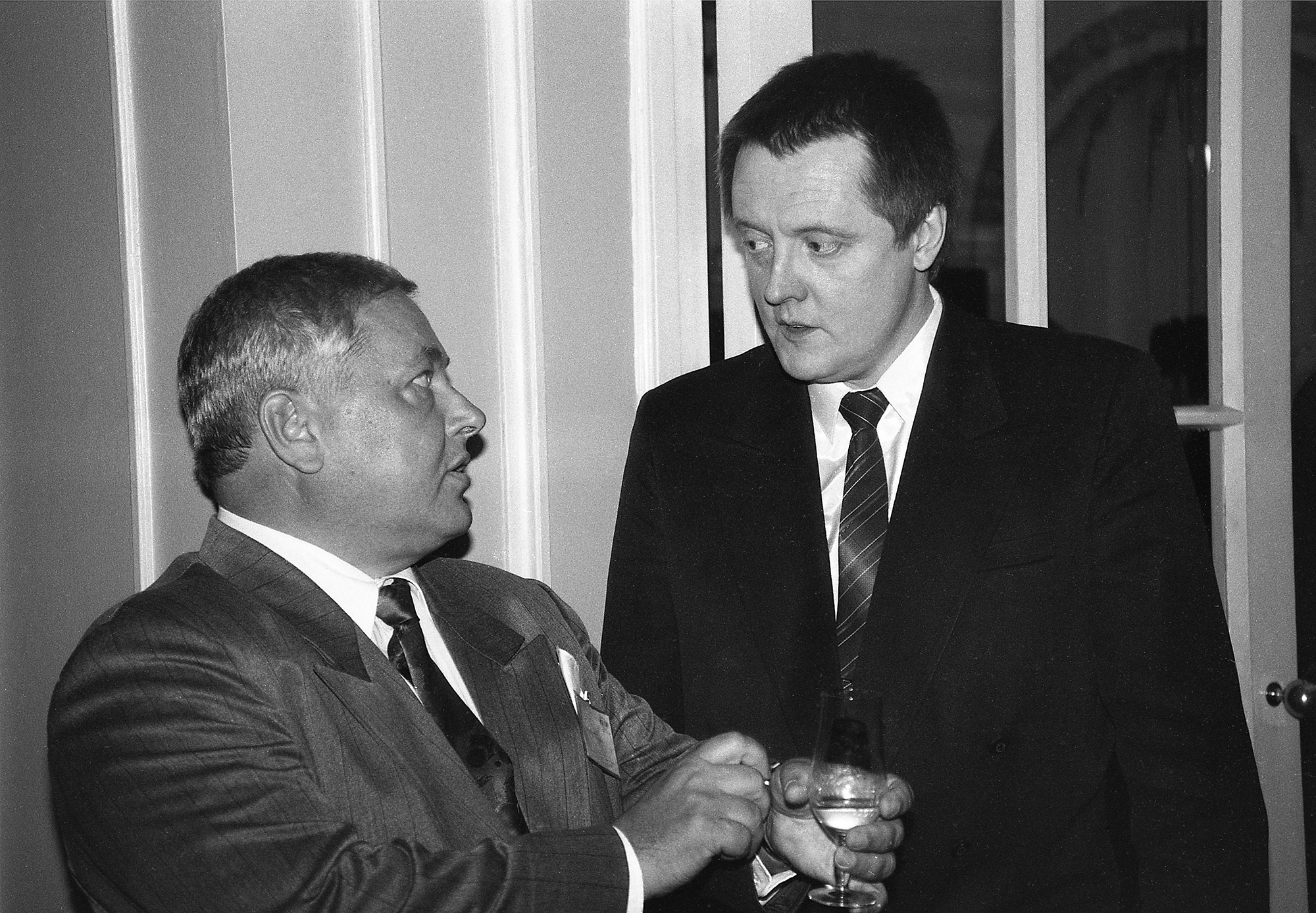 Tõnu Alveus ehk Lesta ja Margus Lepa ehk Jorh Adniel Kiir 92